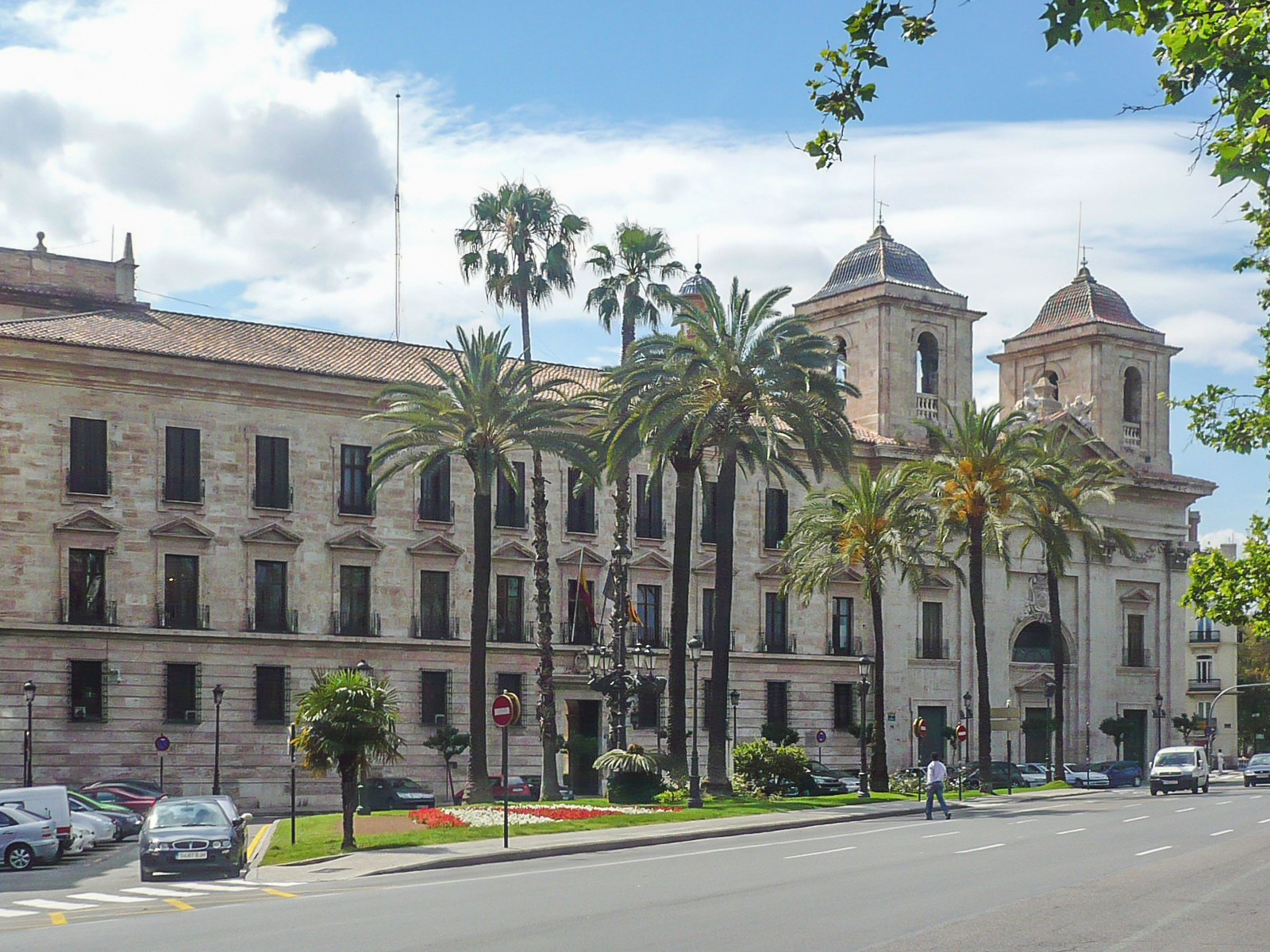 Complejo del Temple, junto a la plaza donde se encontraba una de las antiguas puertas de la ciudad romana y musulmana, tras la conquista, se entregó al Temple para que la protegiera.